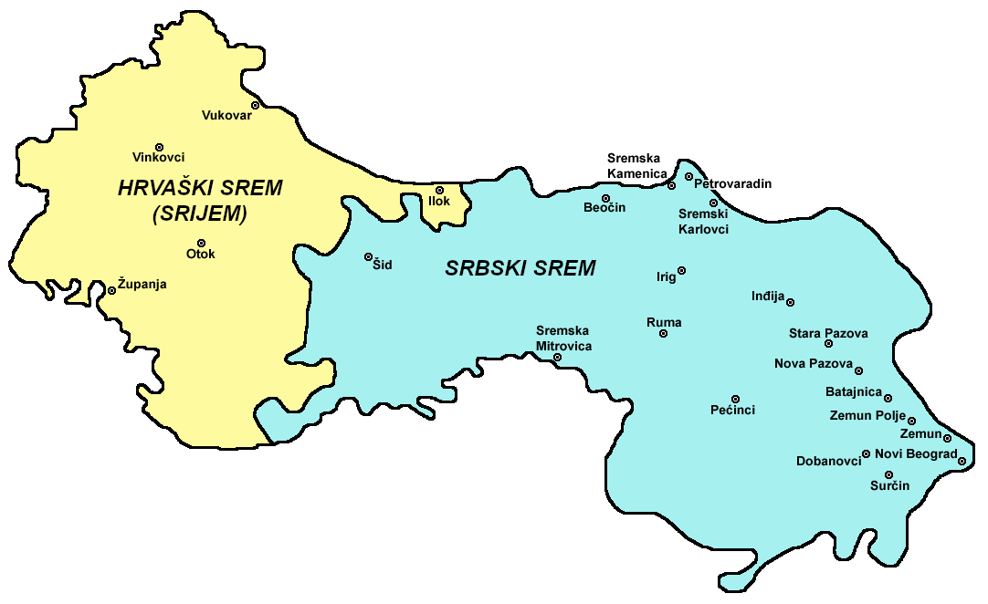 Zemljevid Srema